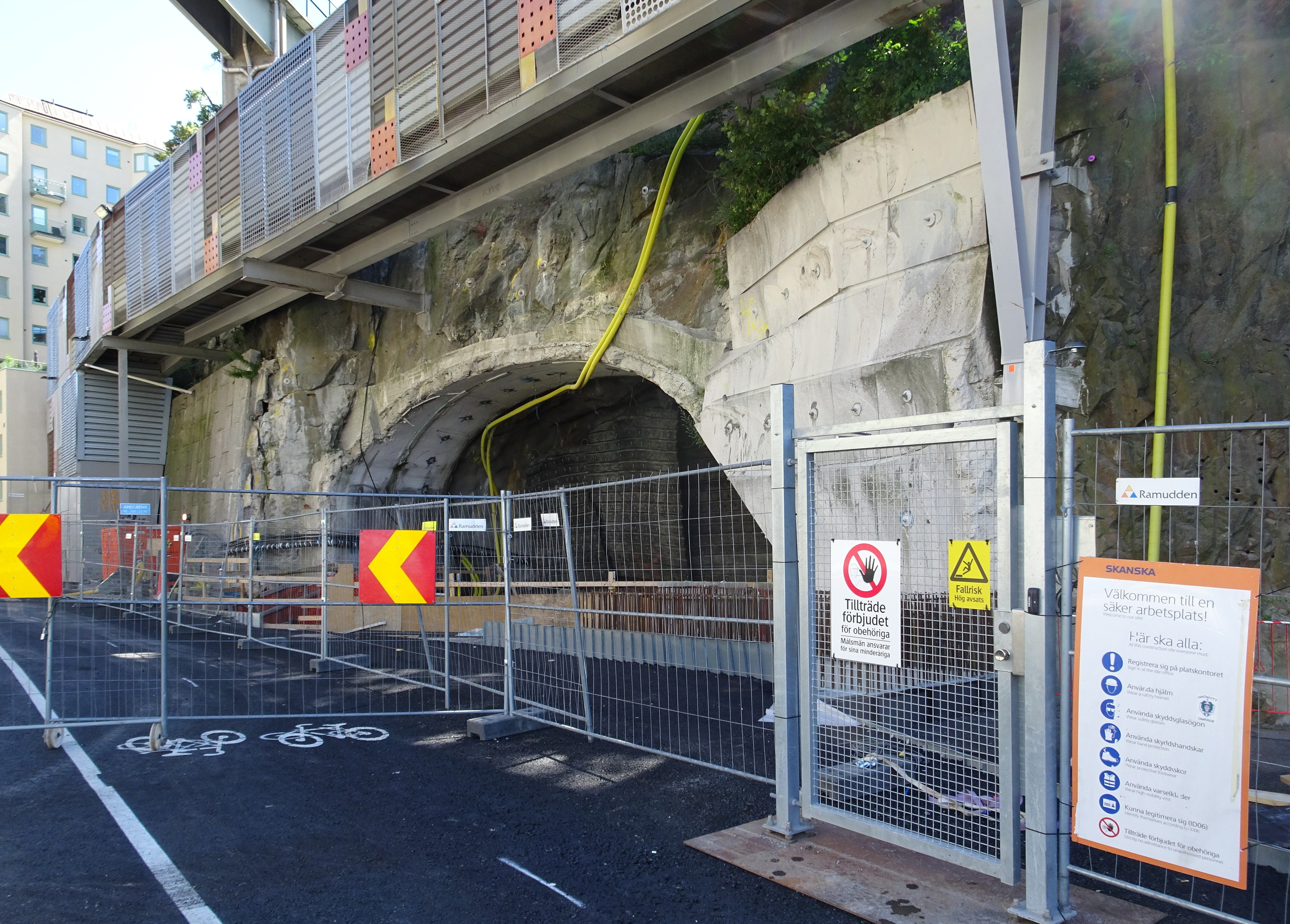 Infarten till Katarinagaraget vid Katarinavägen